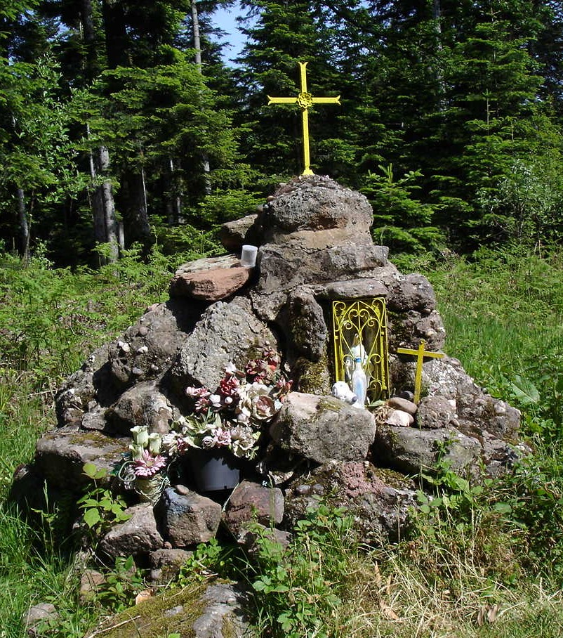 croix et chapelle avec une vierge, sur monticule de pierres lieu-dit Le Haut Port, en rive droite de la Plaine, commune de Raon-l'Étape, altitude 607m - carte IGN 3616 ouest